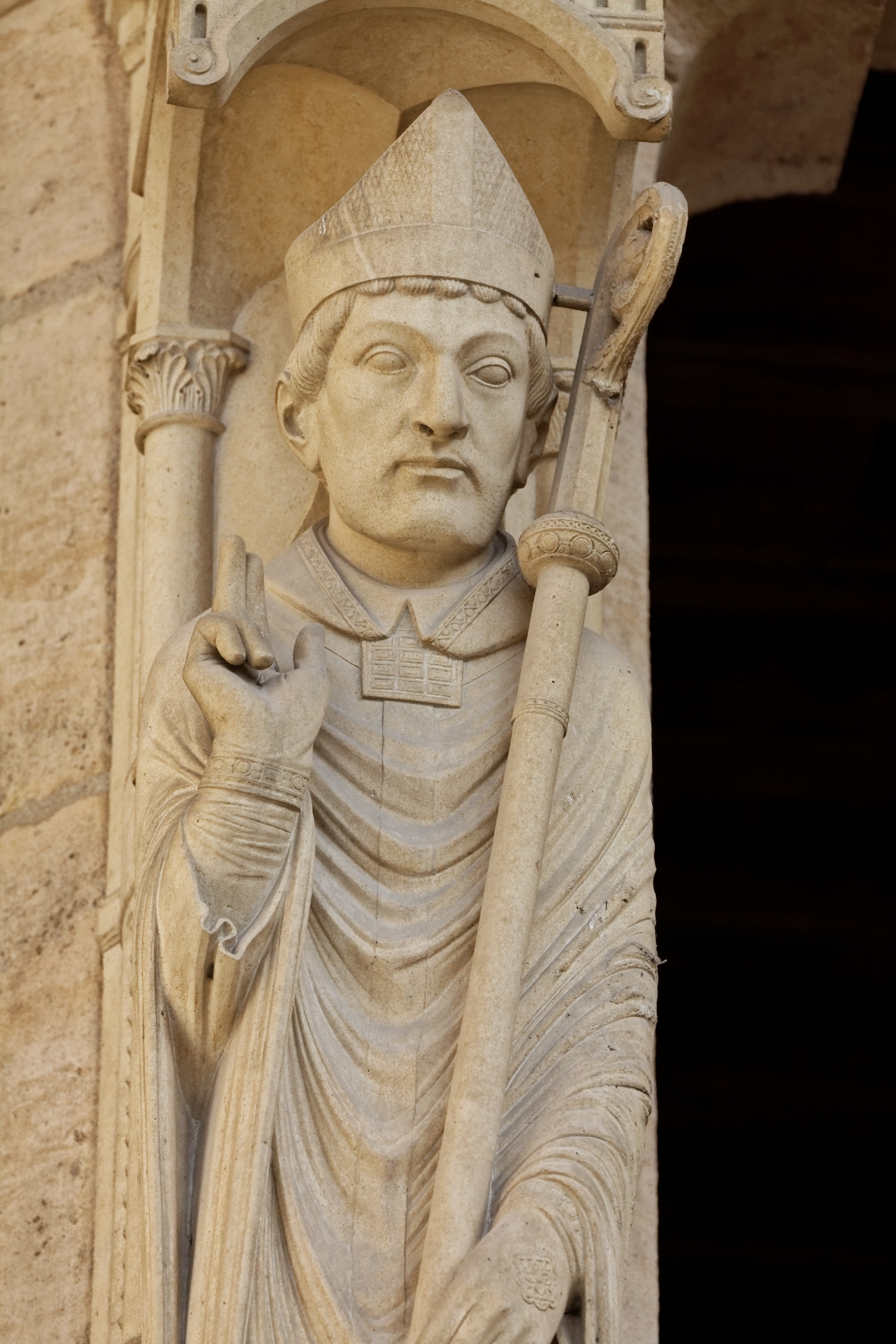 Vue d'un détail du portail Sainte Anne sur la façade ouest de la cathédrale Notre-Dame de Paris.